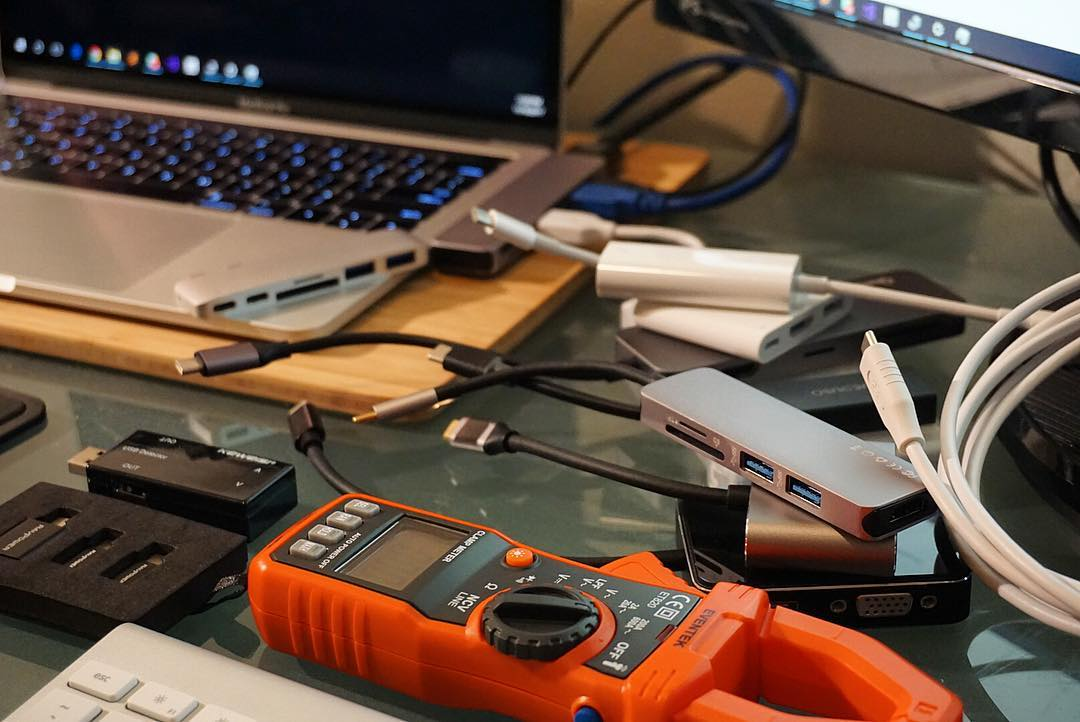 via Instagram ift.tt/2hrxN8a